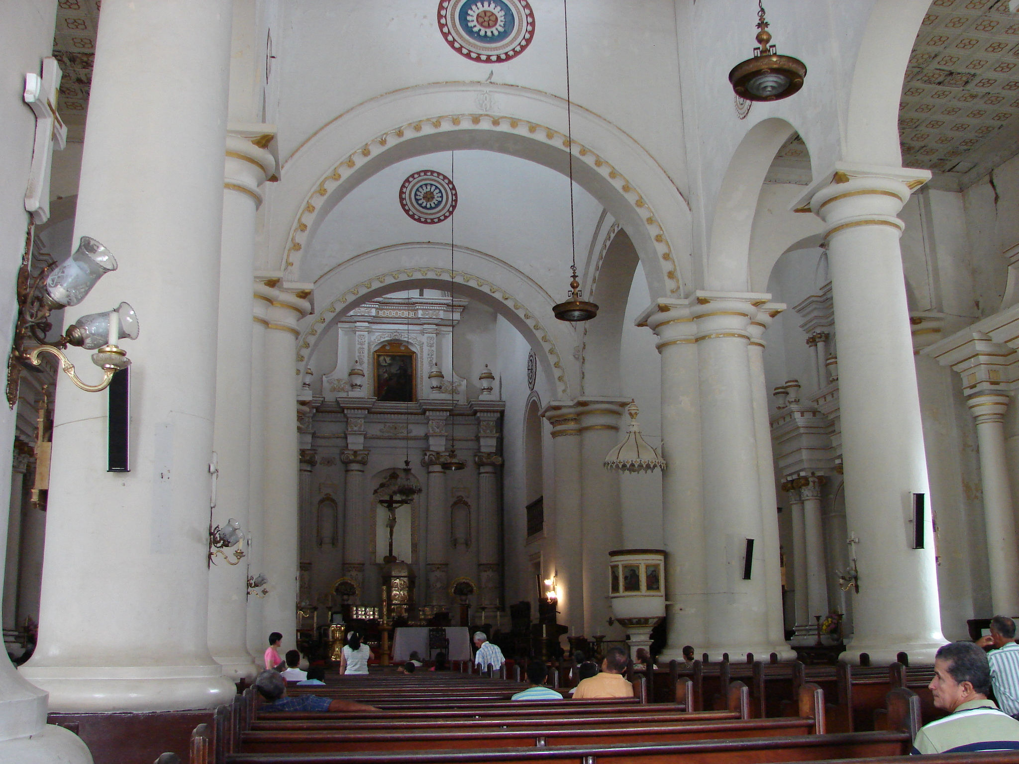 Interior de la Catedral Basílica de Santa Fe de Antioquia, Colombia